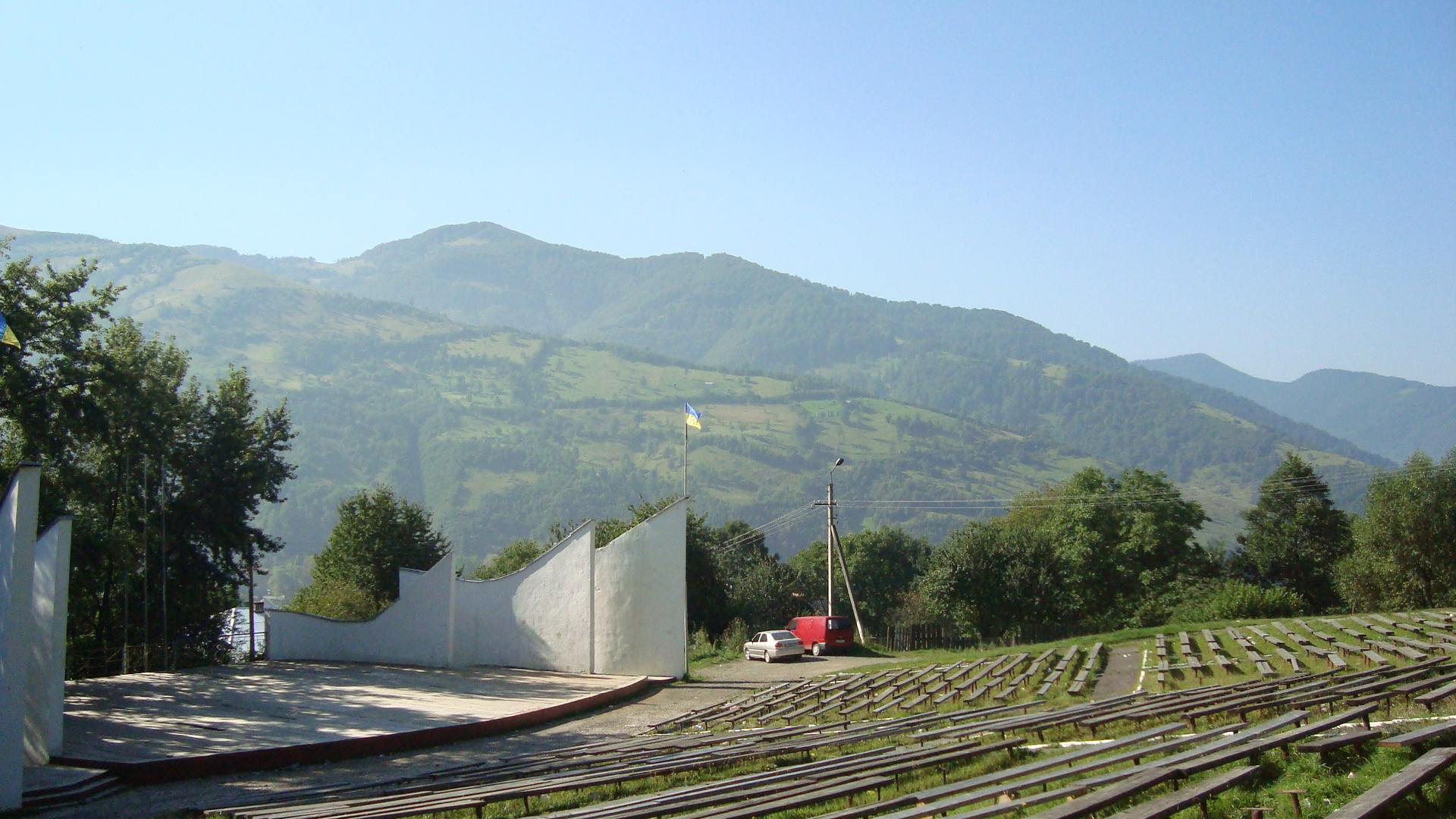 Амфітеатр у Рахові. Знаходиться в урочищі Буркут. Щорічно тут проходять різноманітні фестивалі.